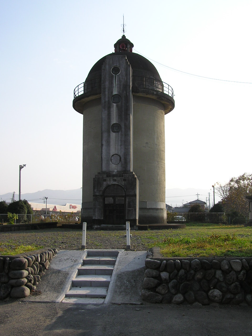 児玉給水塔